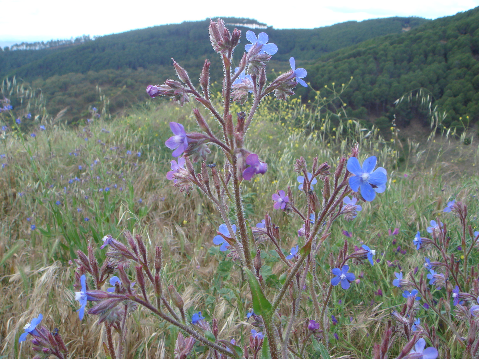 Anchusa azurea, Almonaster, Huelva, España